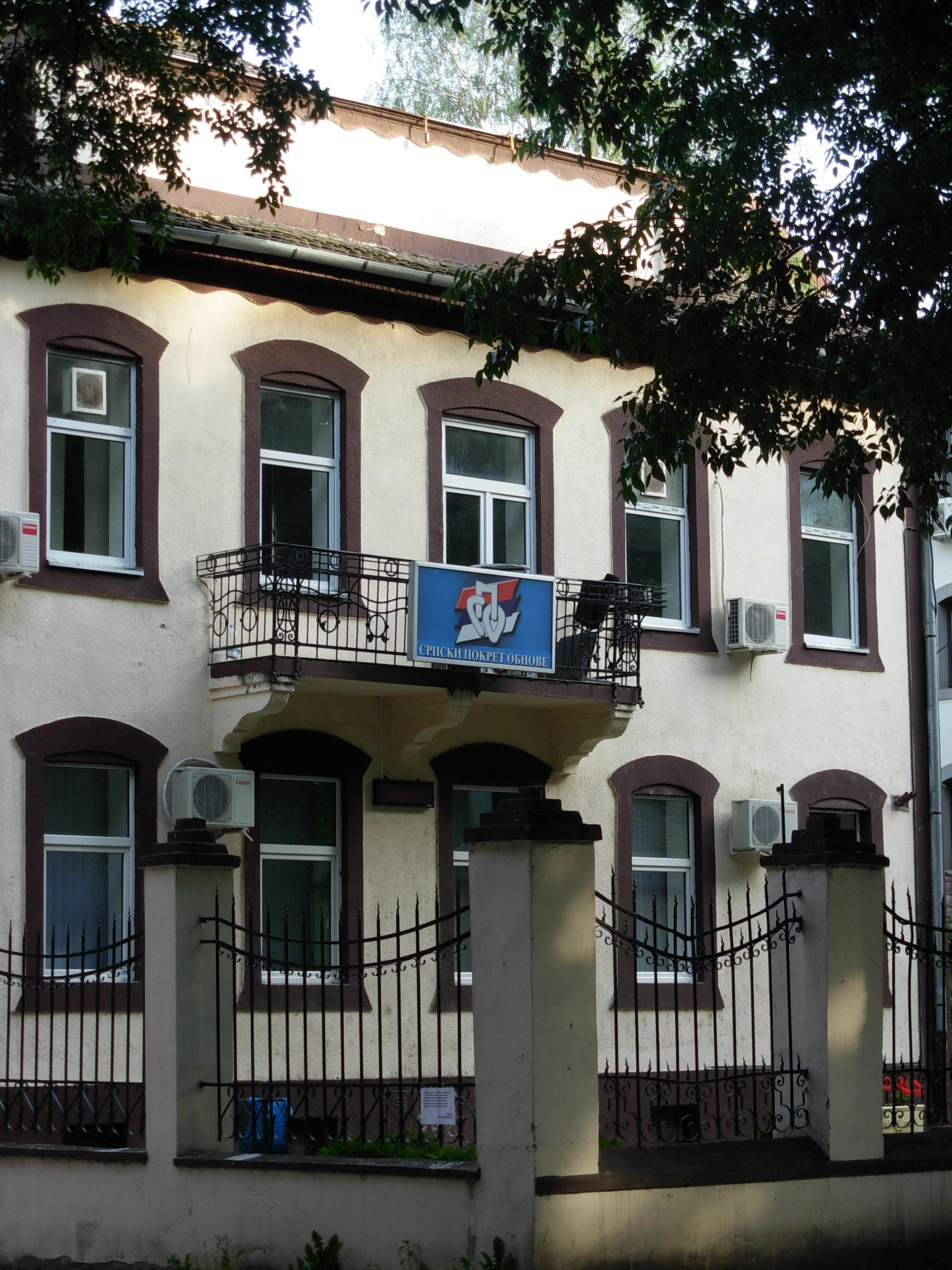 Sedište Srpskog pokreta obnove u Novom Sadu.